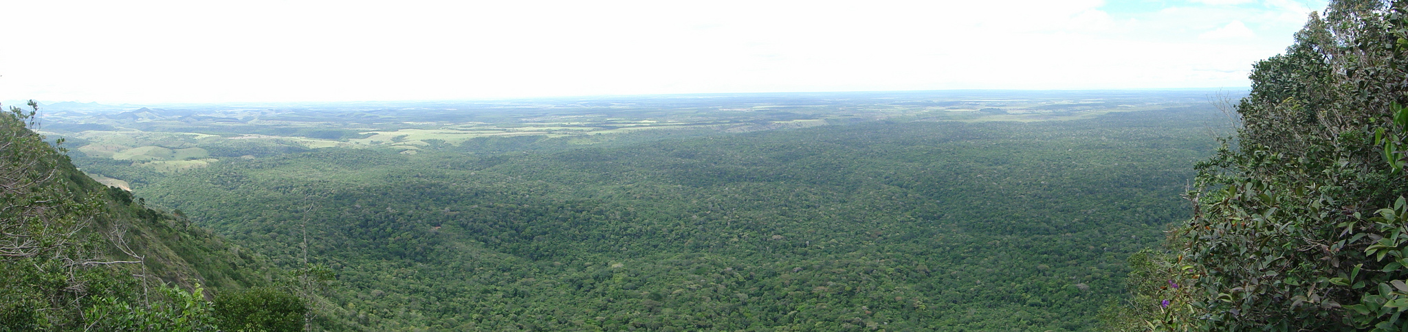 Foto panorâmica do PARNA do Monte Pascoal.